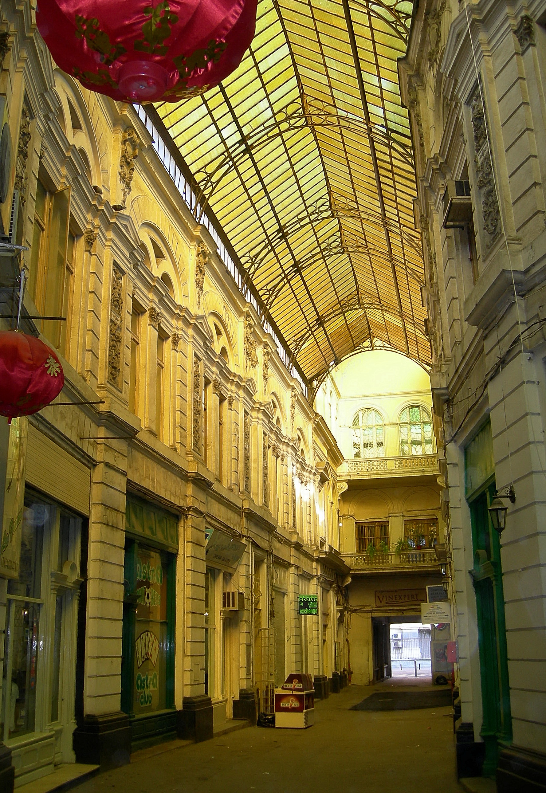 Pasajul Macca-Vilacrosse, Bucharest, Romania. Interior.